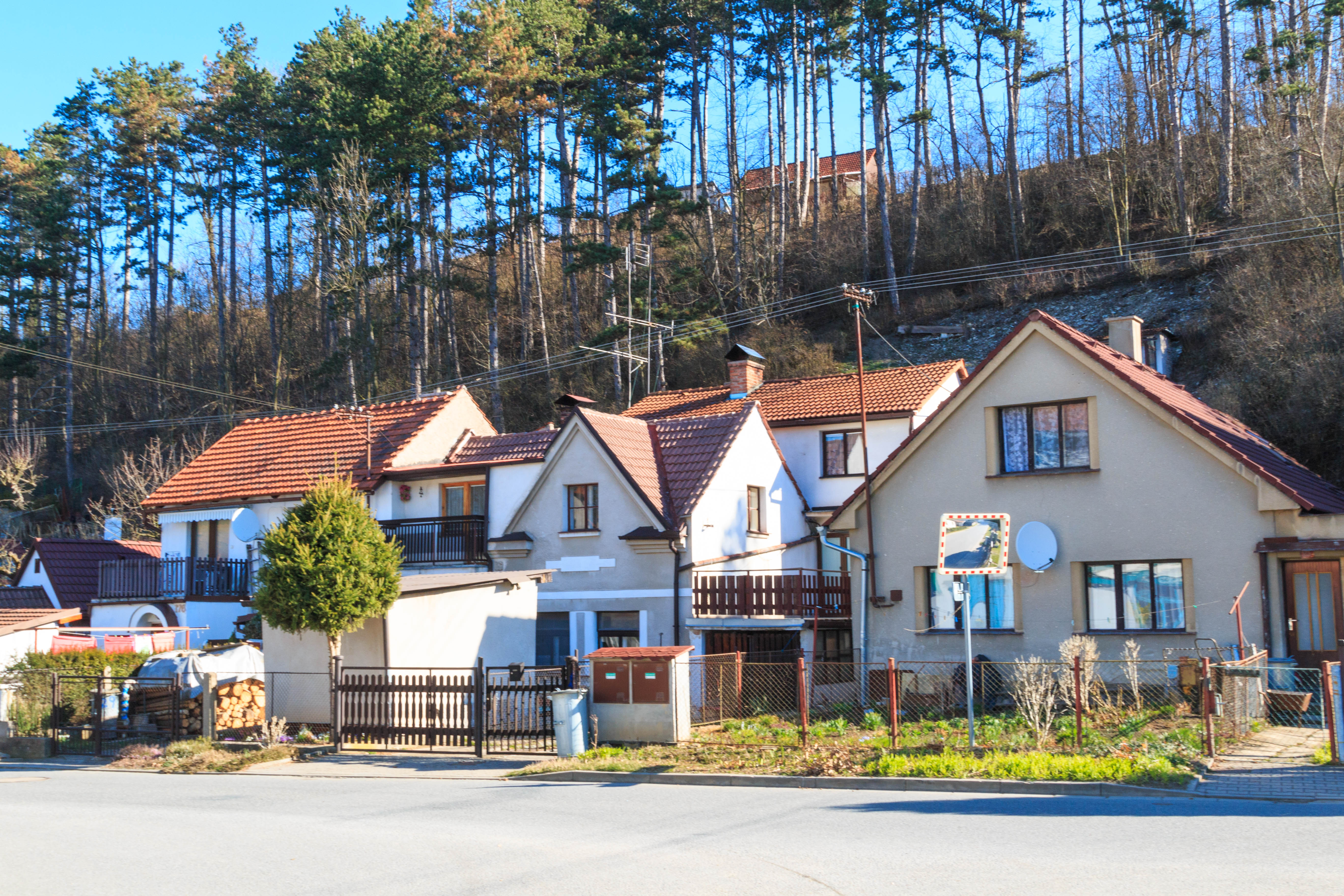 Zdislav - dům čp. 29